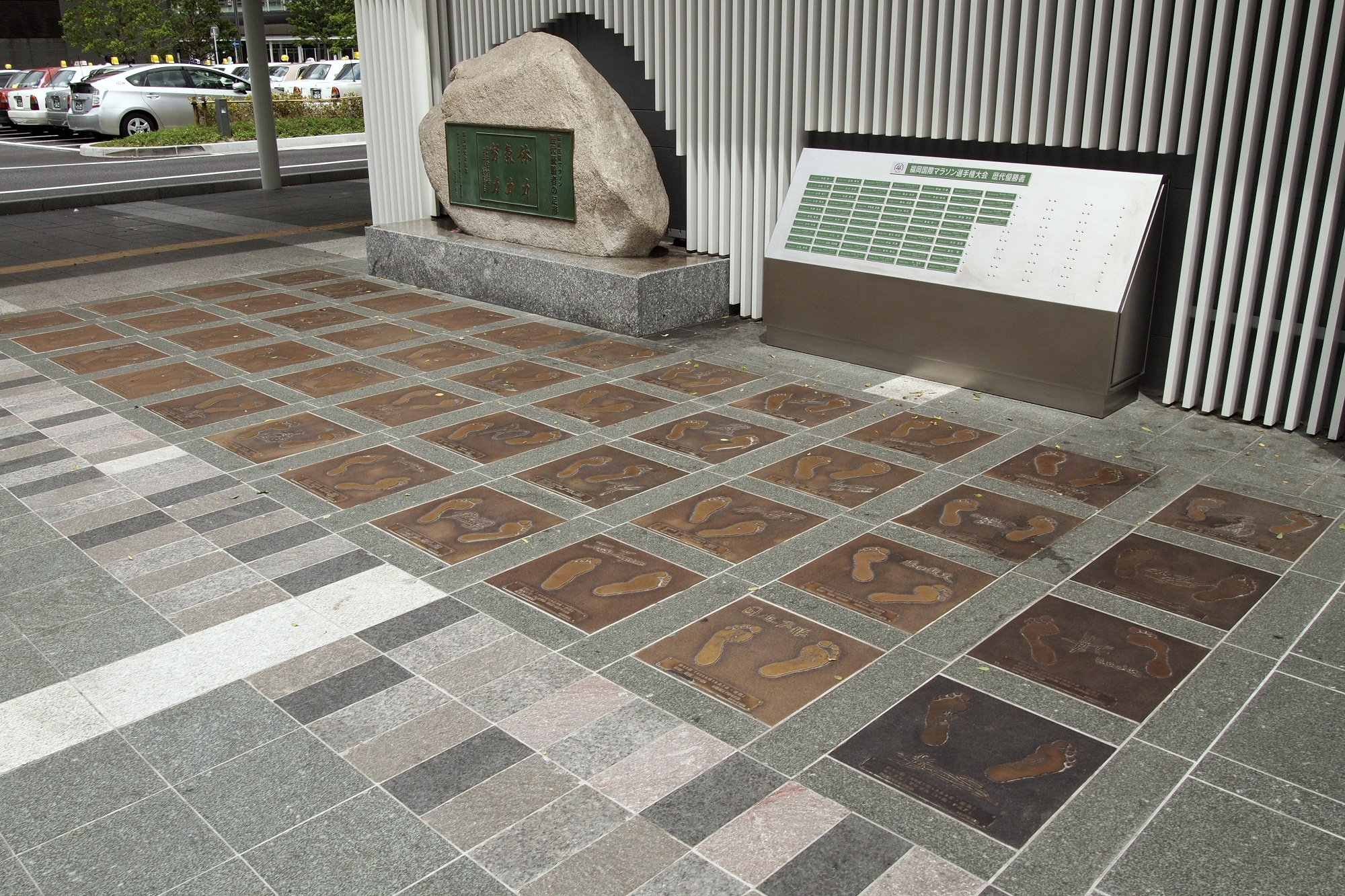 博多駅前にある福岡国際マラソンのモニュメントと足形プレート